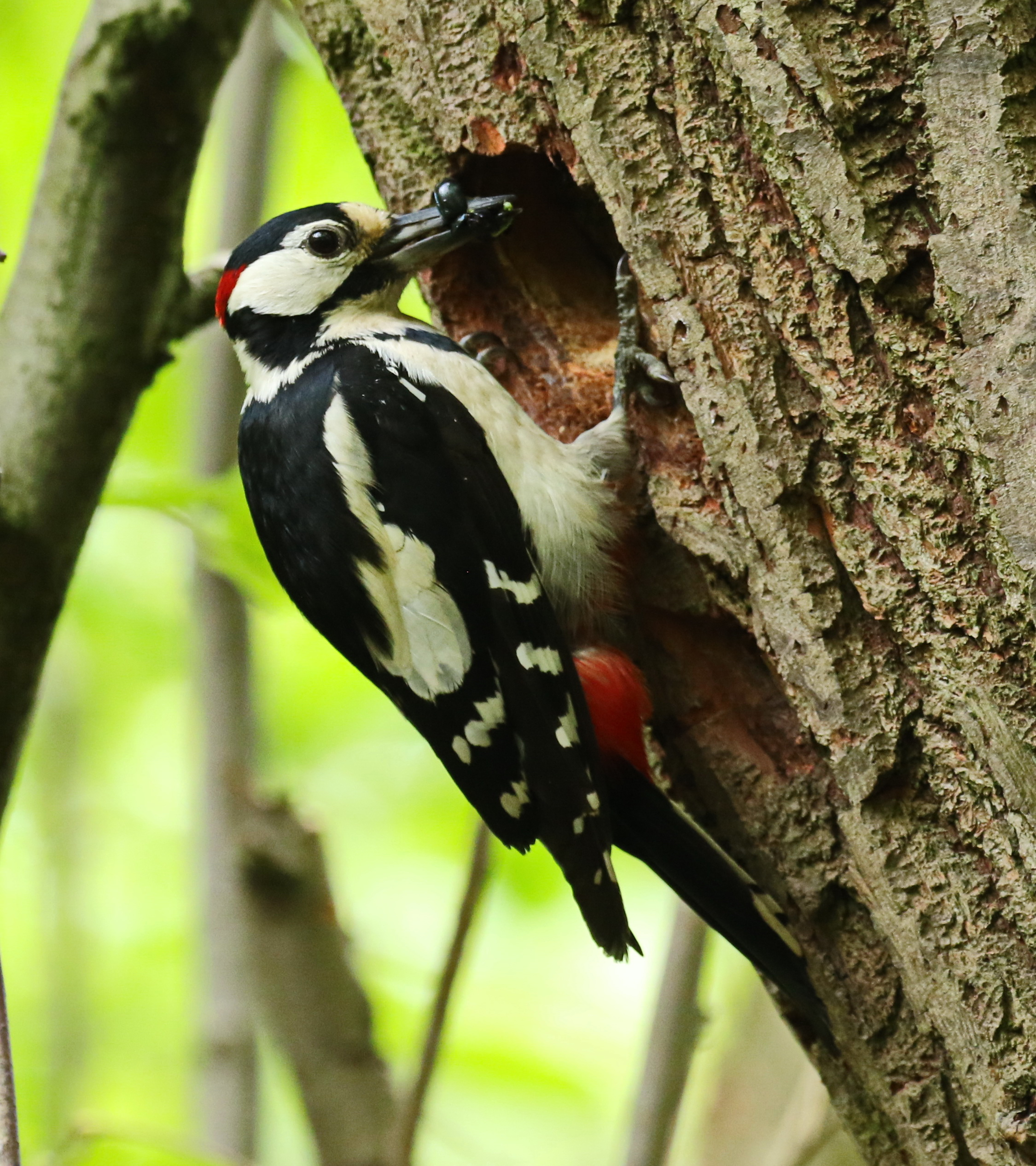 Buntspecht (Dendrocopos major). Geschützter Landschaftsbestandteil Schubertgrund in Lichtenstein. Landkreis Zwickau in Sachsen. Video